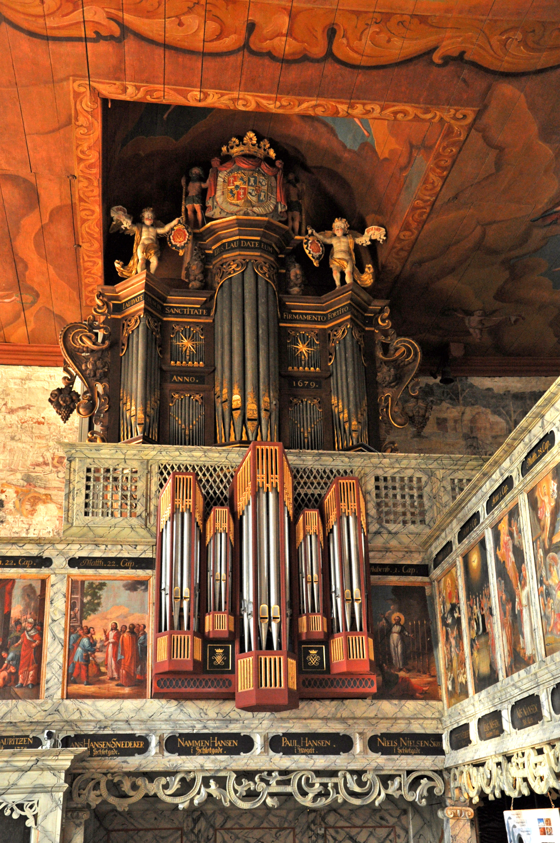 Orgel von Møgeltønder Kirke, Dänemark